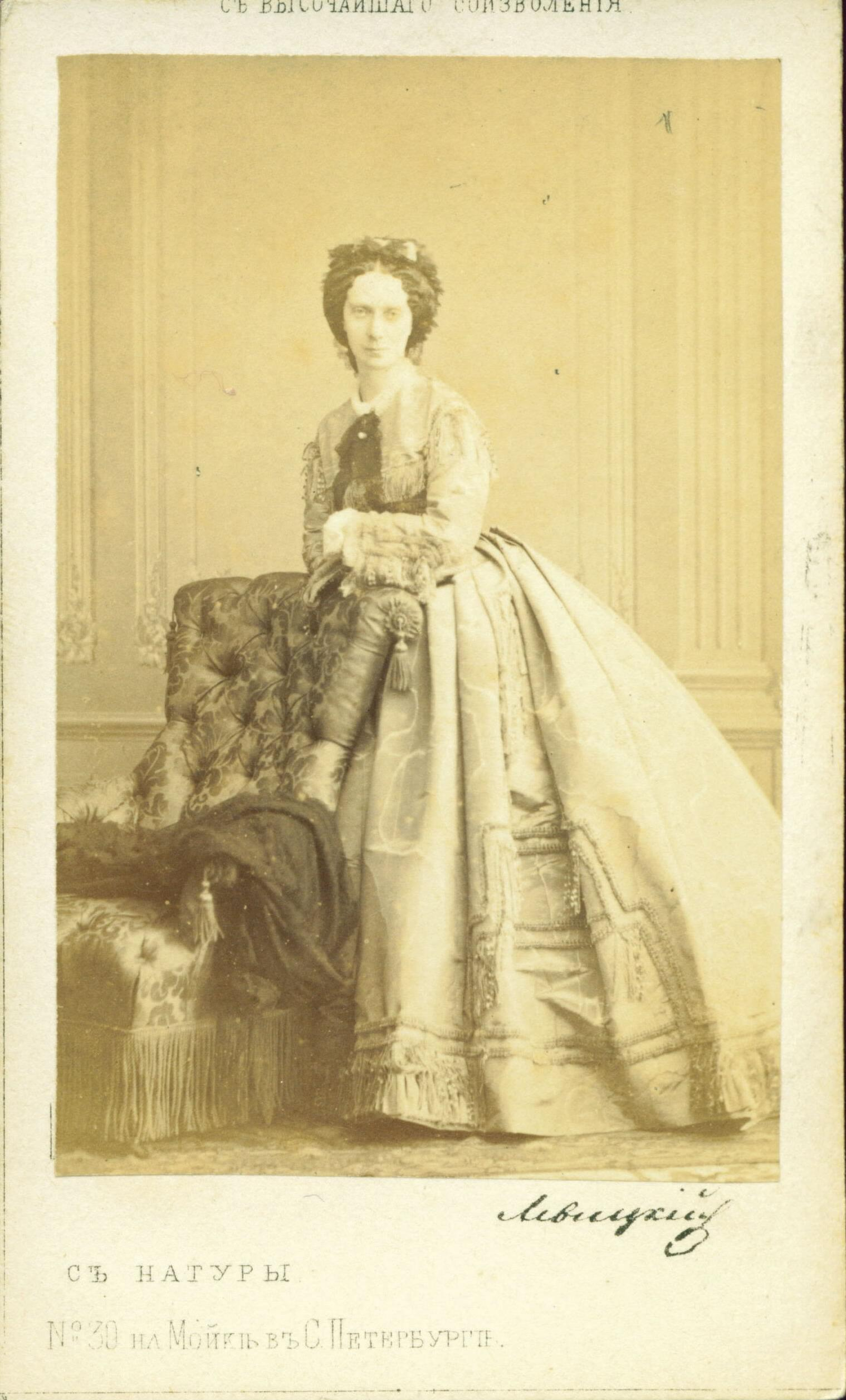 Maria Alexandrovna (1824-1880)